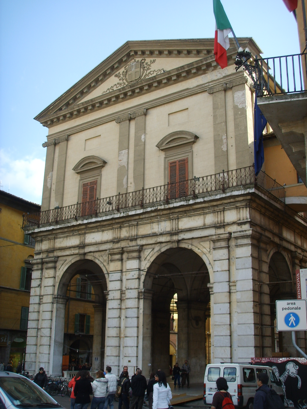 Loggia dei banchi